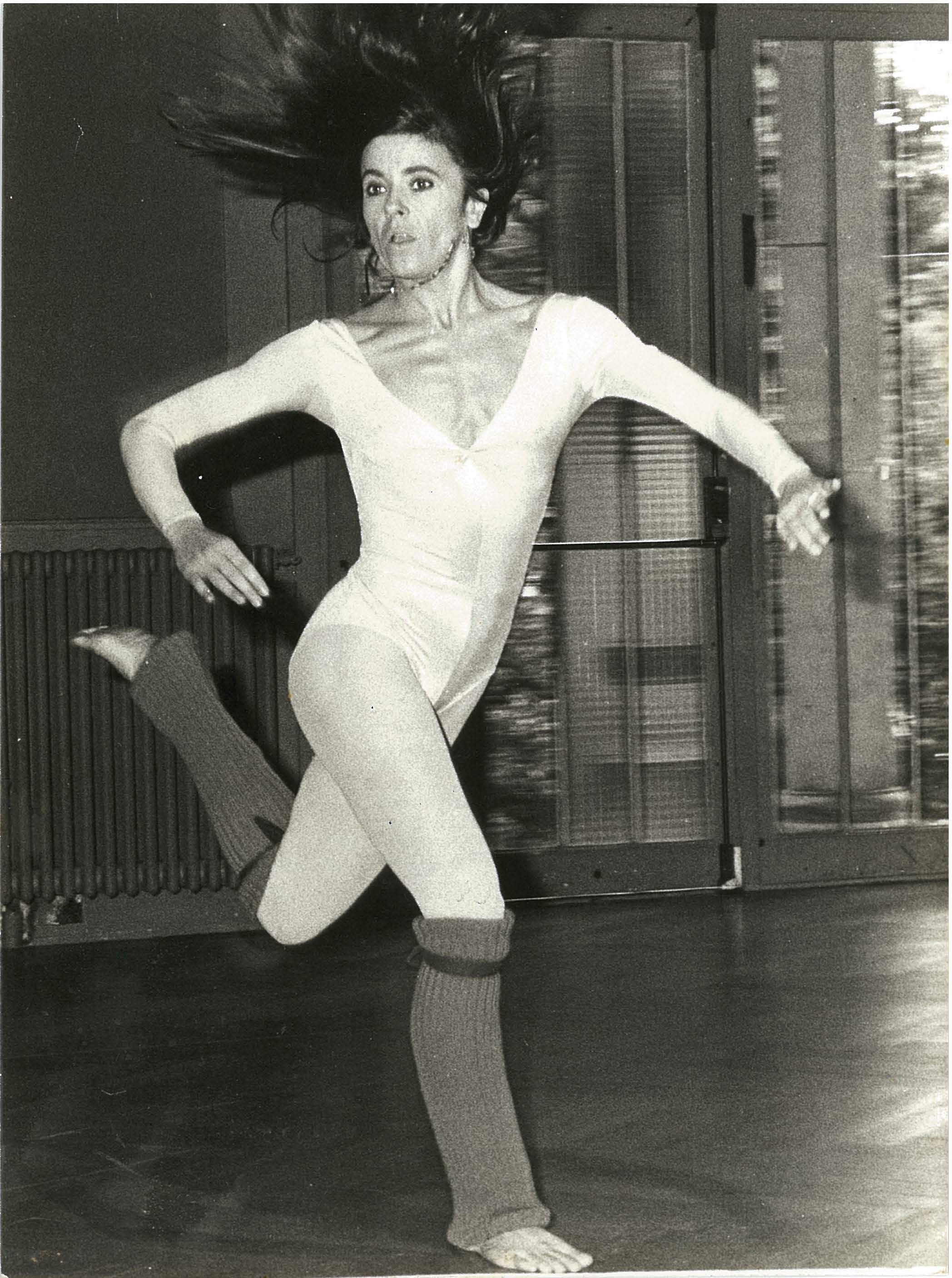 Jeanine Claes dansant